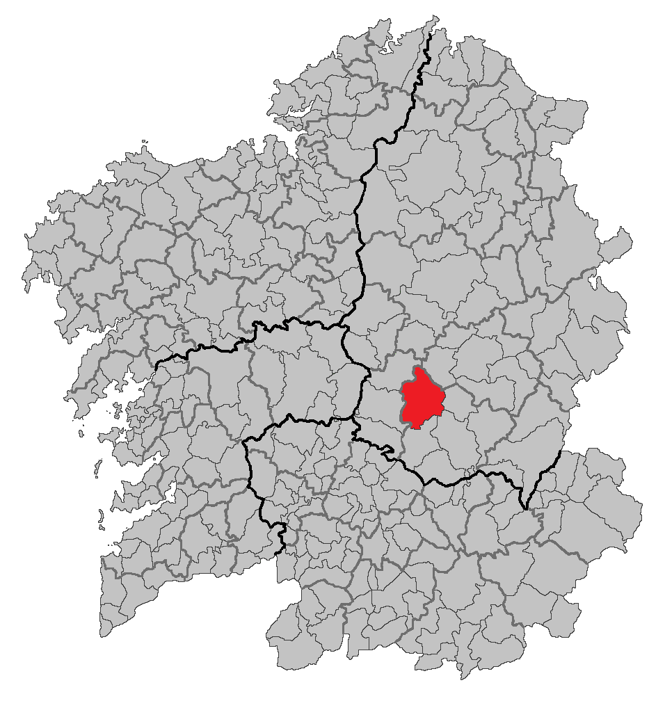 Mapa coa localización do concello de O Saviñao.